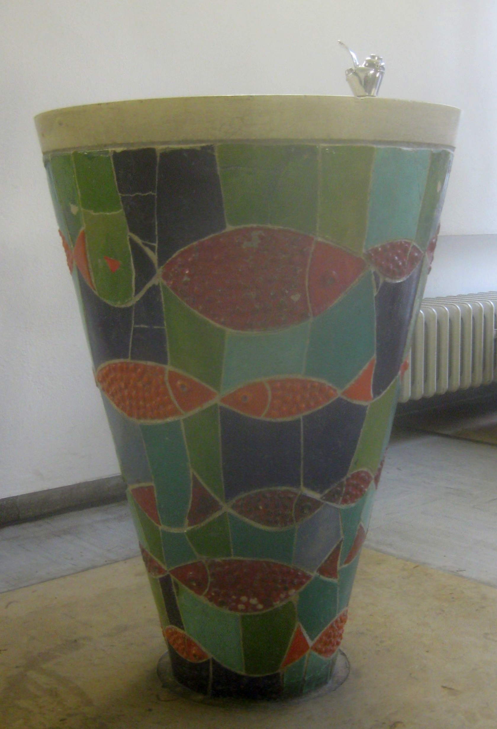 Trinkbrunnen, farbiges keramisches Mosaik von Eva Zippel, 80 x 60 cm, 1961, Stuttgart, Königin-Olga-Stift, 2. Etage.